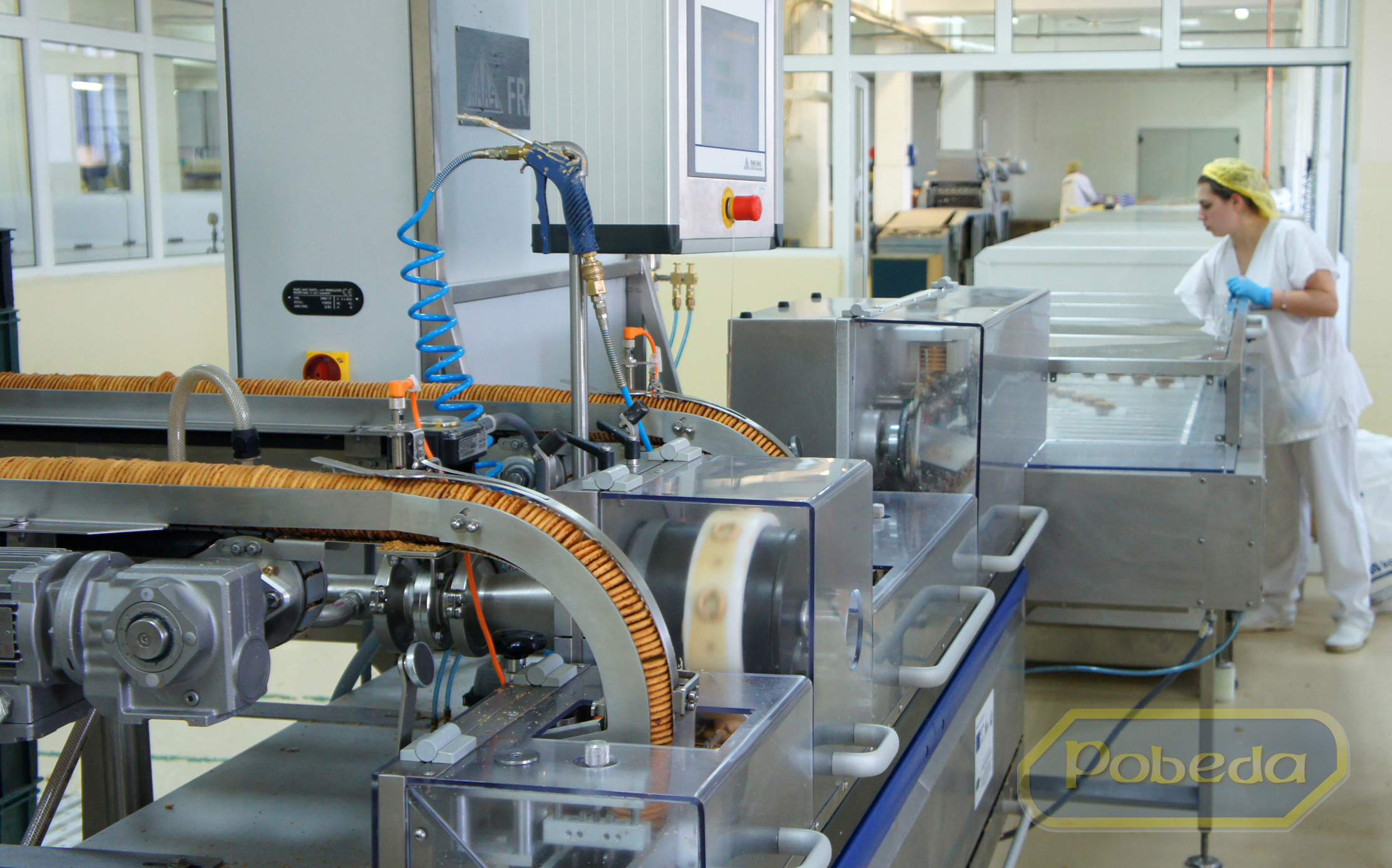 Производство на сандвич бисквити